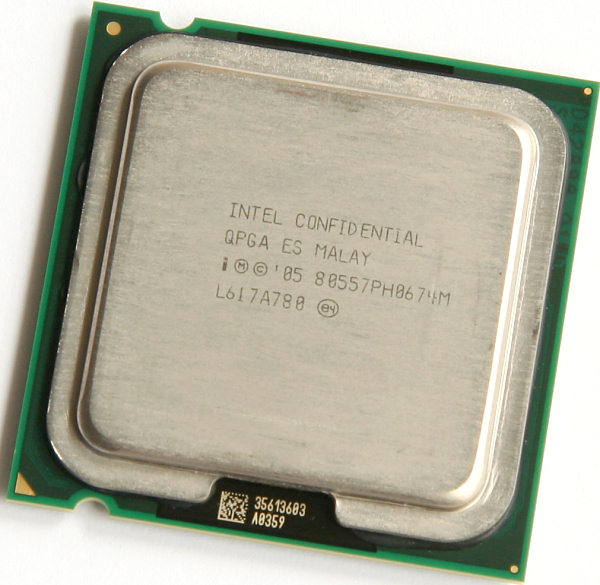 תמונה של המעבד E6700 מסדרת Core 2 Duo.